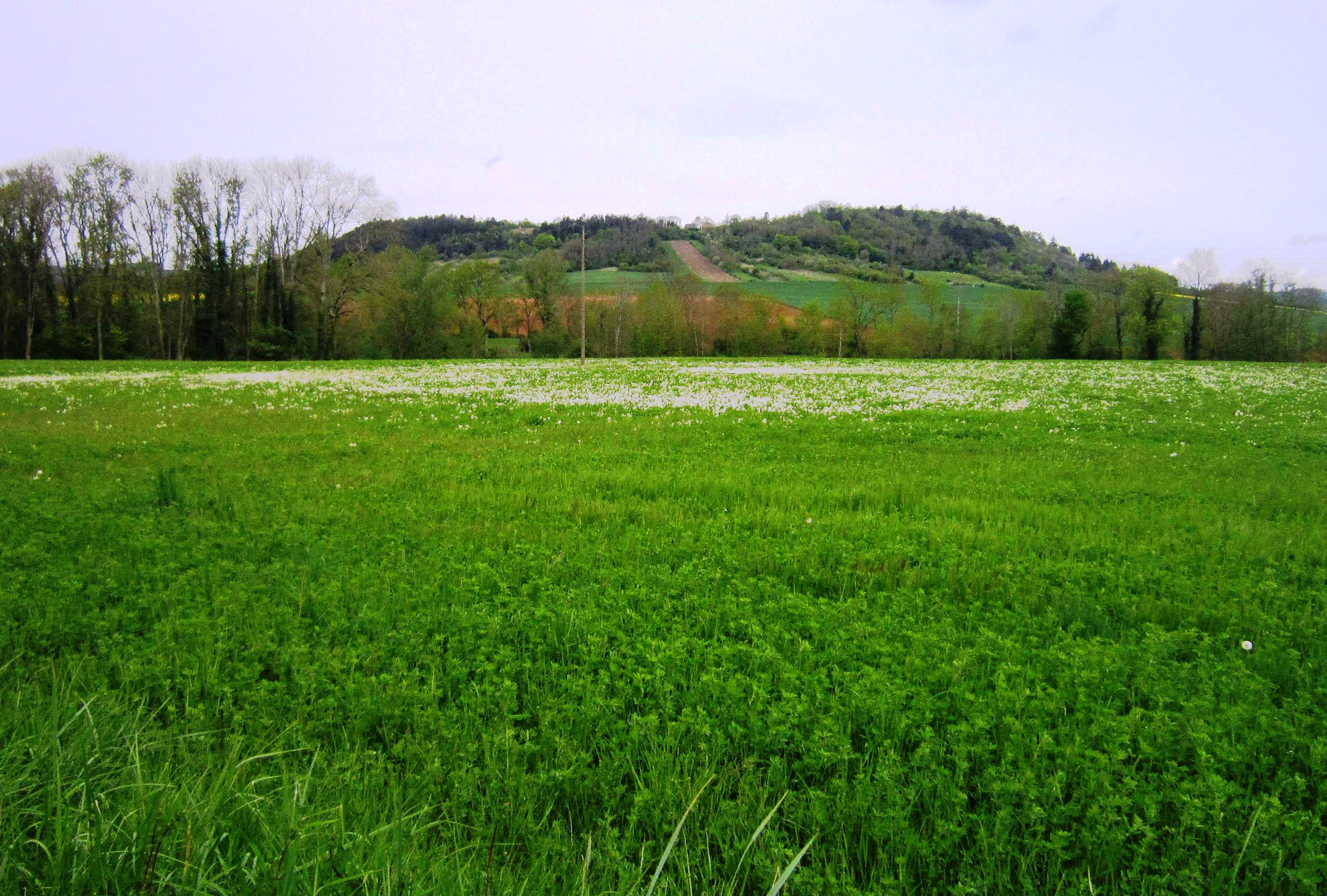 Le Mont Lassois (Côte-d'Or)